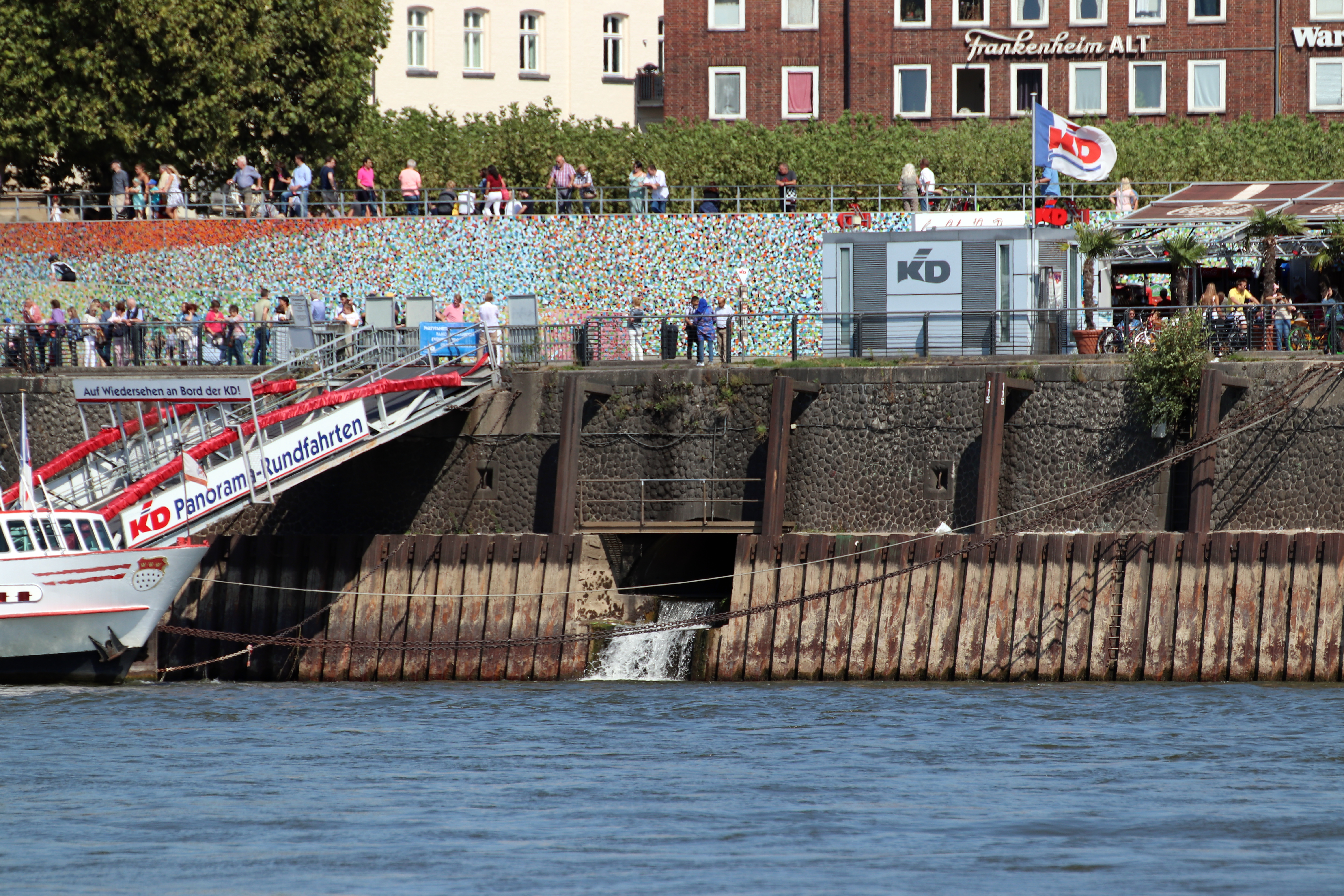 Mündung der nördlichen Düssel unterhalb der Rheinuferpromenade in Düsseldorf